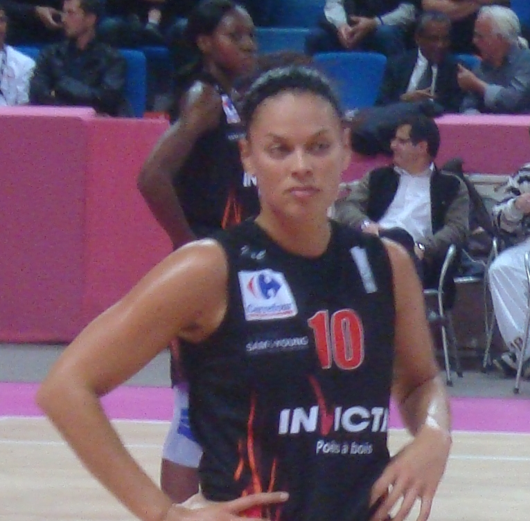 La basketteuse américaine Kristen Mann